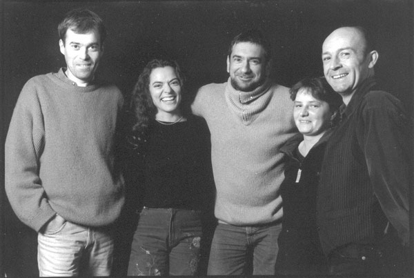 Strollad Loened Fall